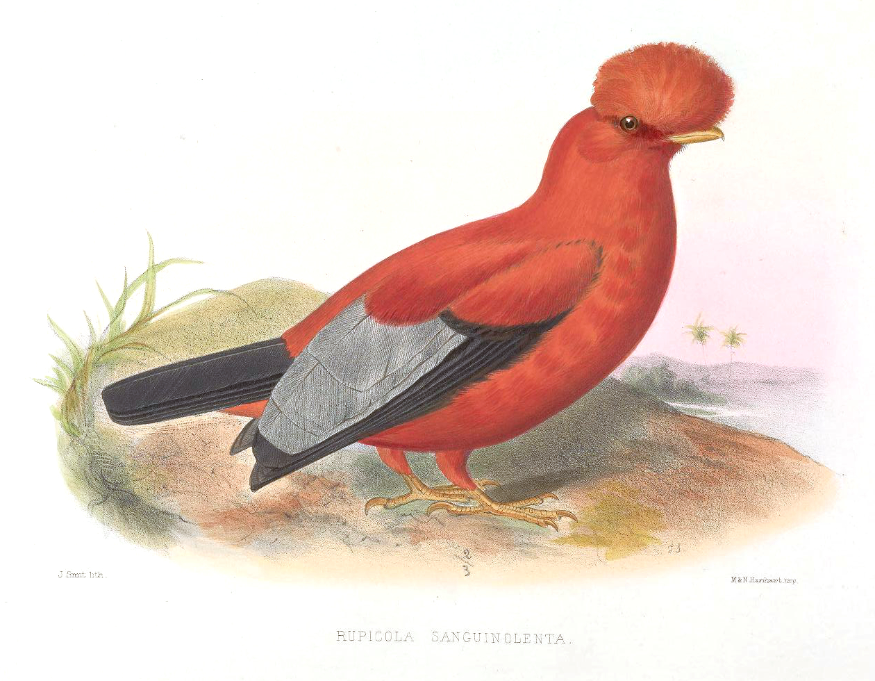 Rupicola peruviana sanguinolenta